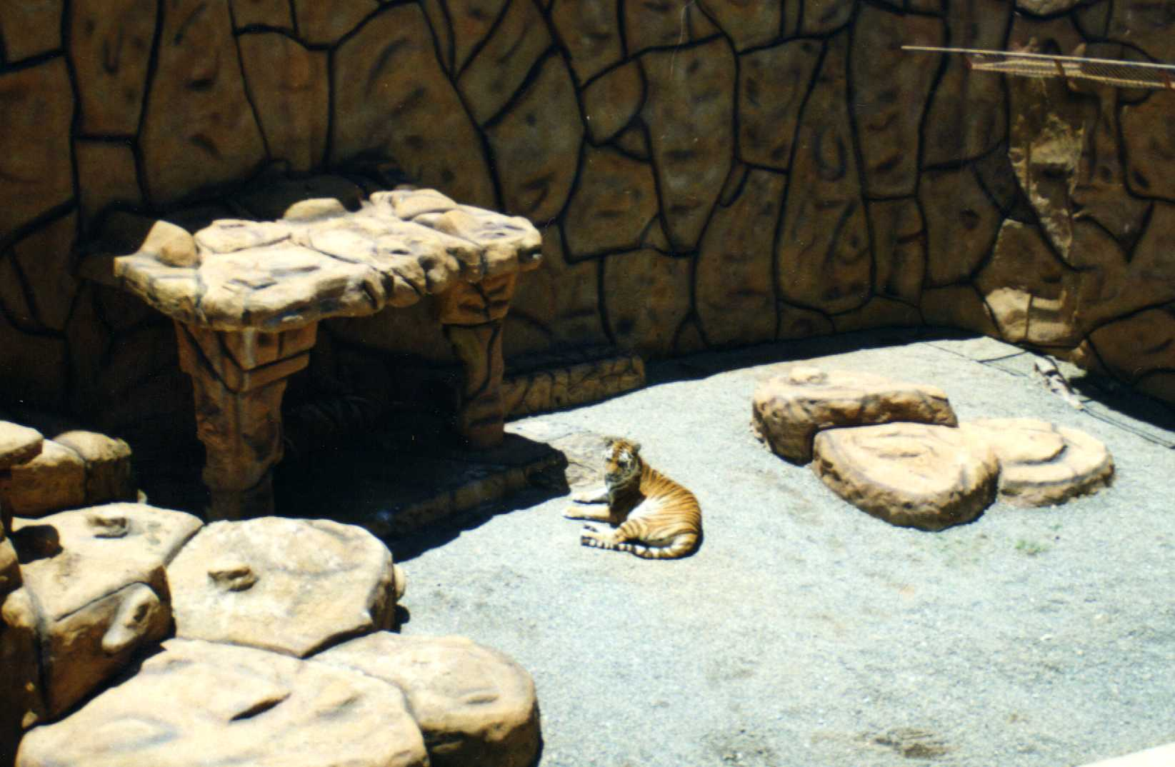 Pasarela de los Tigres dentro del parque temático Beto Carrero World en Brasil.